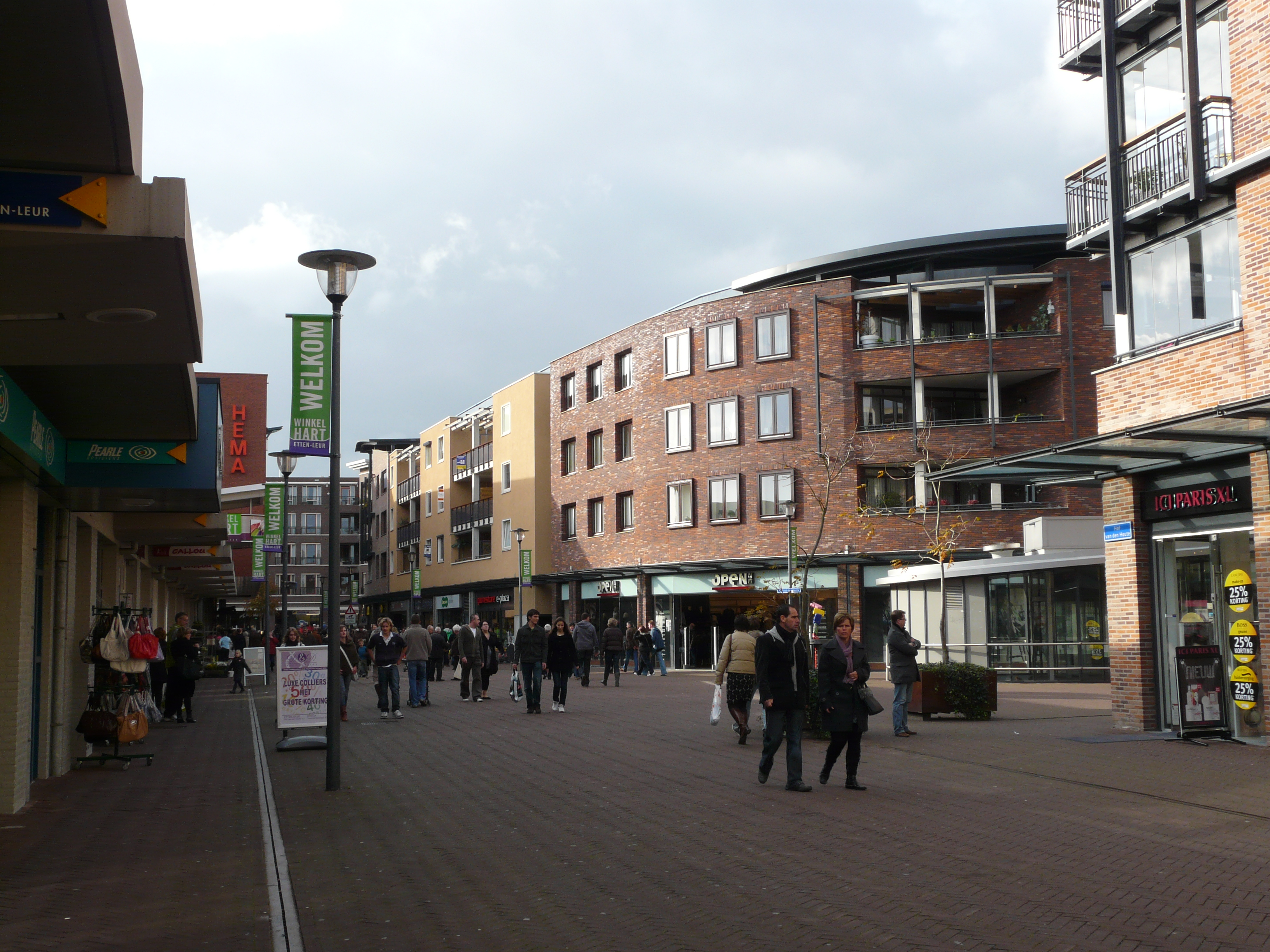 Zicht op een deel van het buitengedeelte van het Winkelcentrum Etten-Leur in het centrum van Etten-Leur